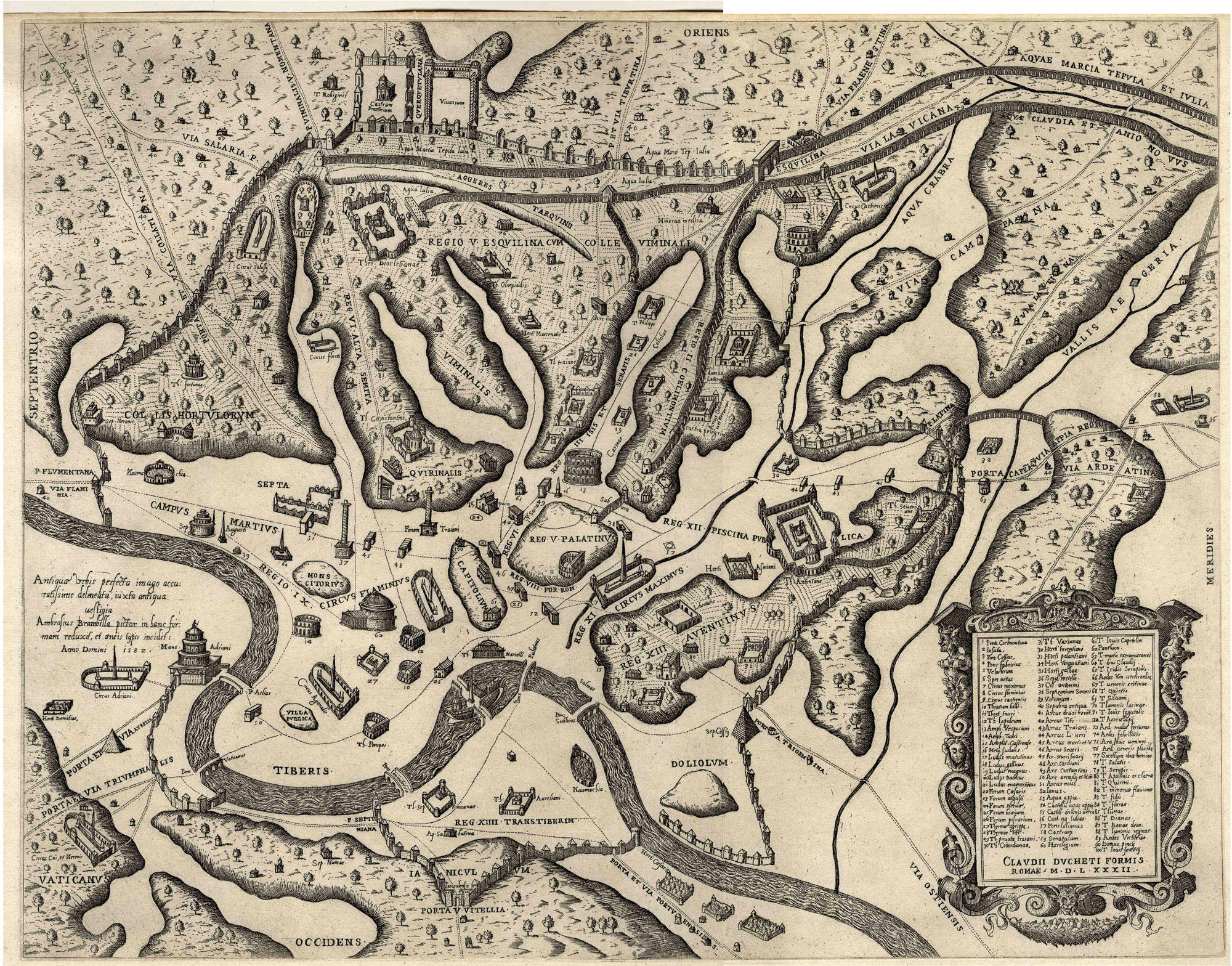 Brambilla, Ambrosius: Antiquae urbis [Romae] perfecta imago ...; Kupferstich, 1582